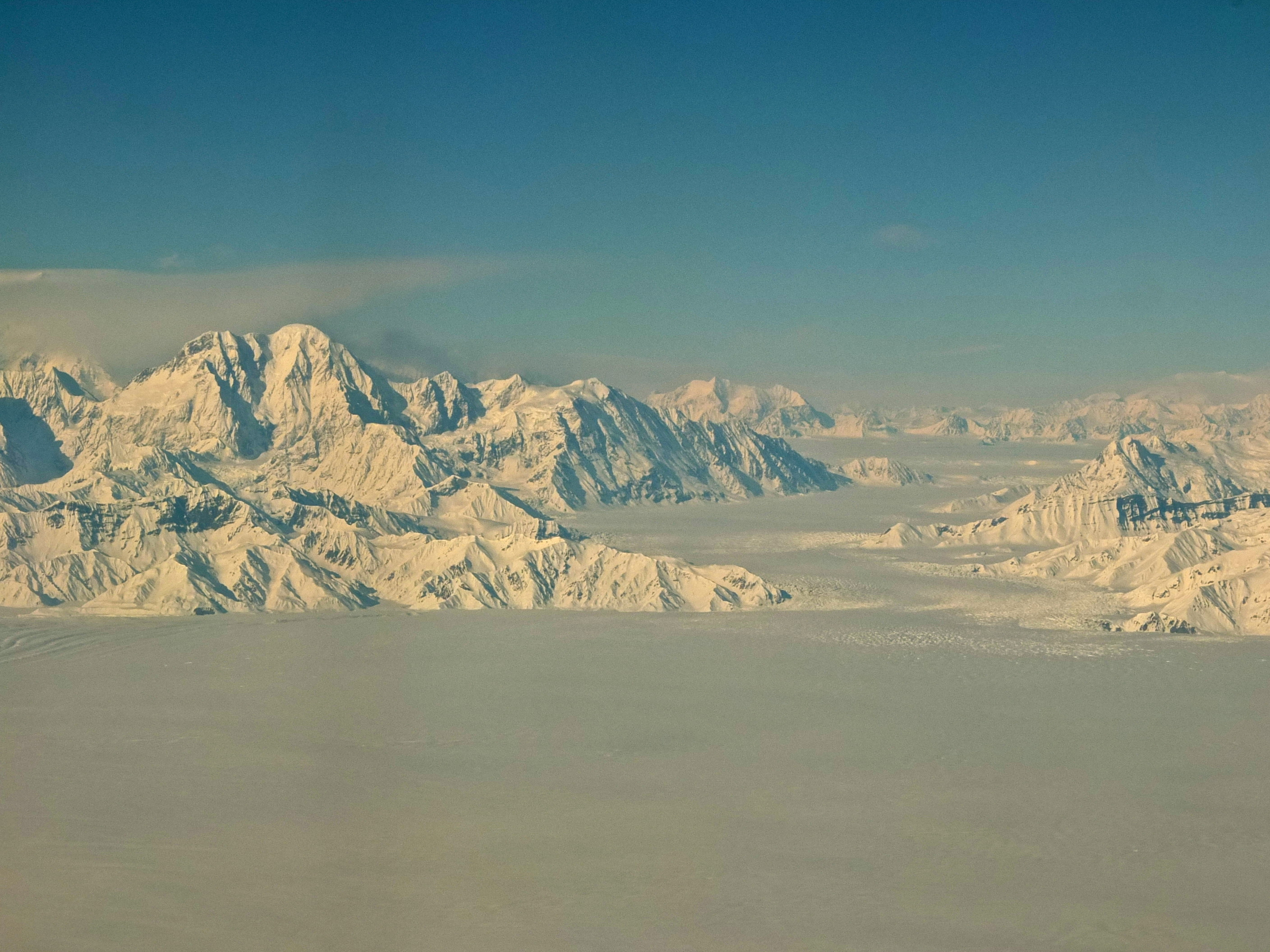 Malaspina Glacier